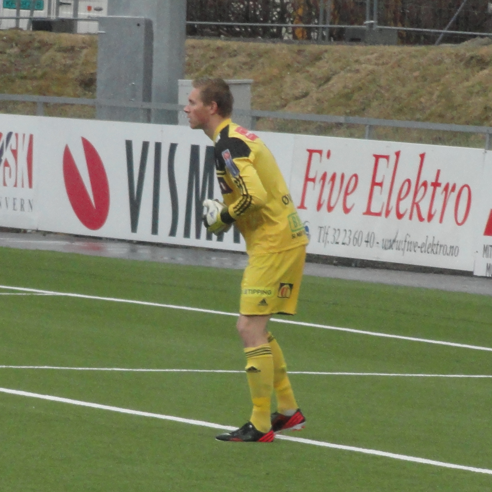 Lars Øvernes for HamKam borte mot Mjøndalen IF 28. april 2013